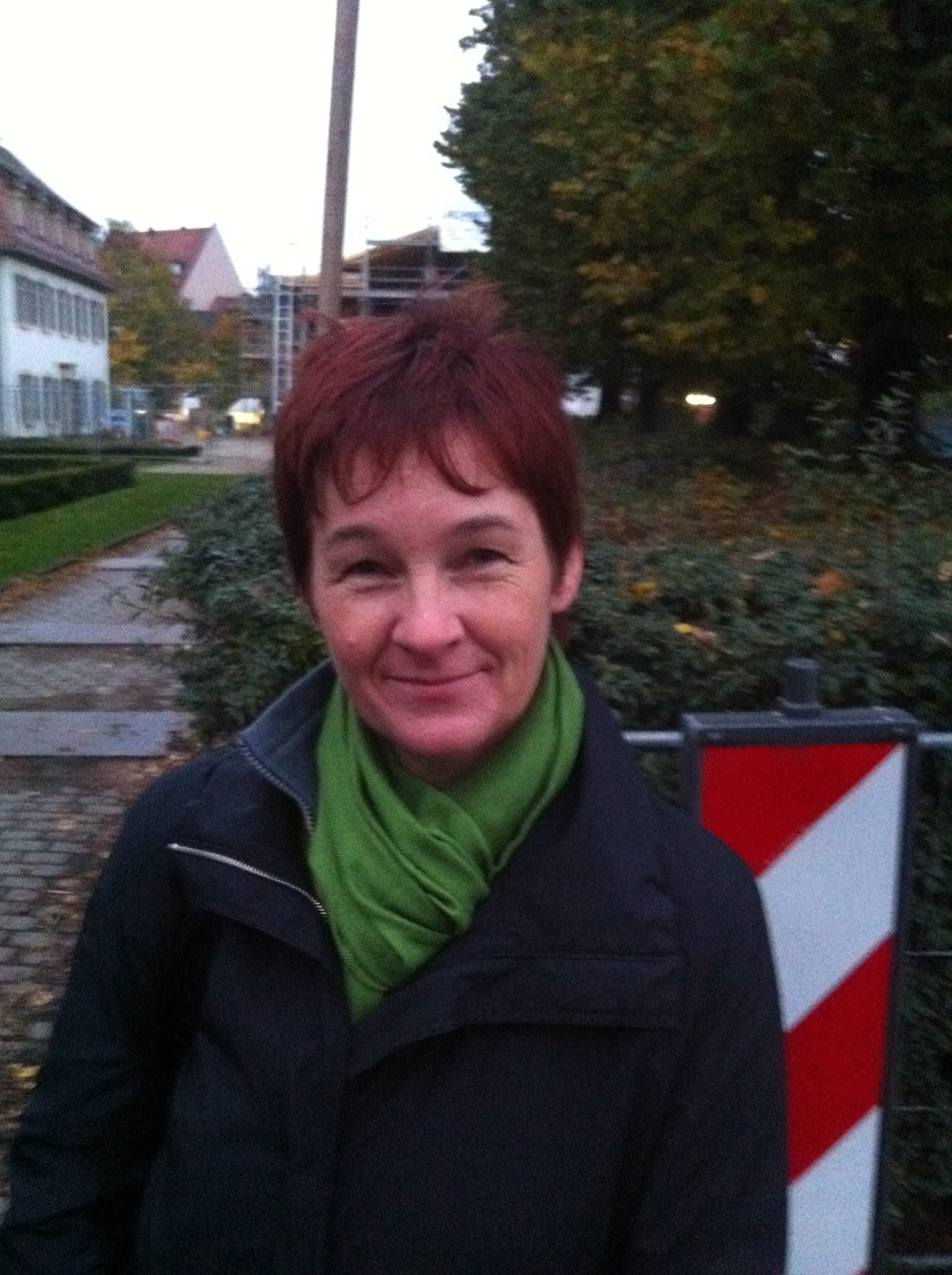 Ulrike Gote auf dem Datenschutzspaziergang in Bamberg.